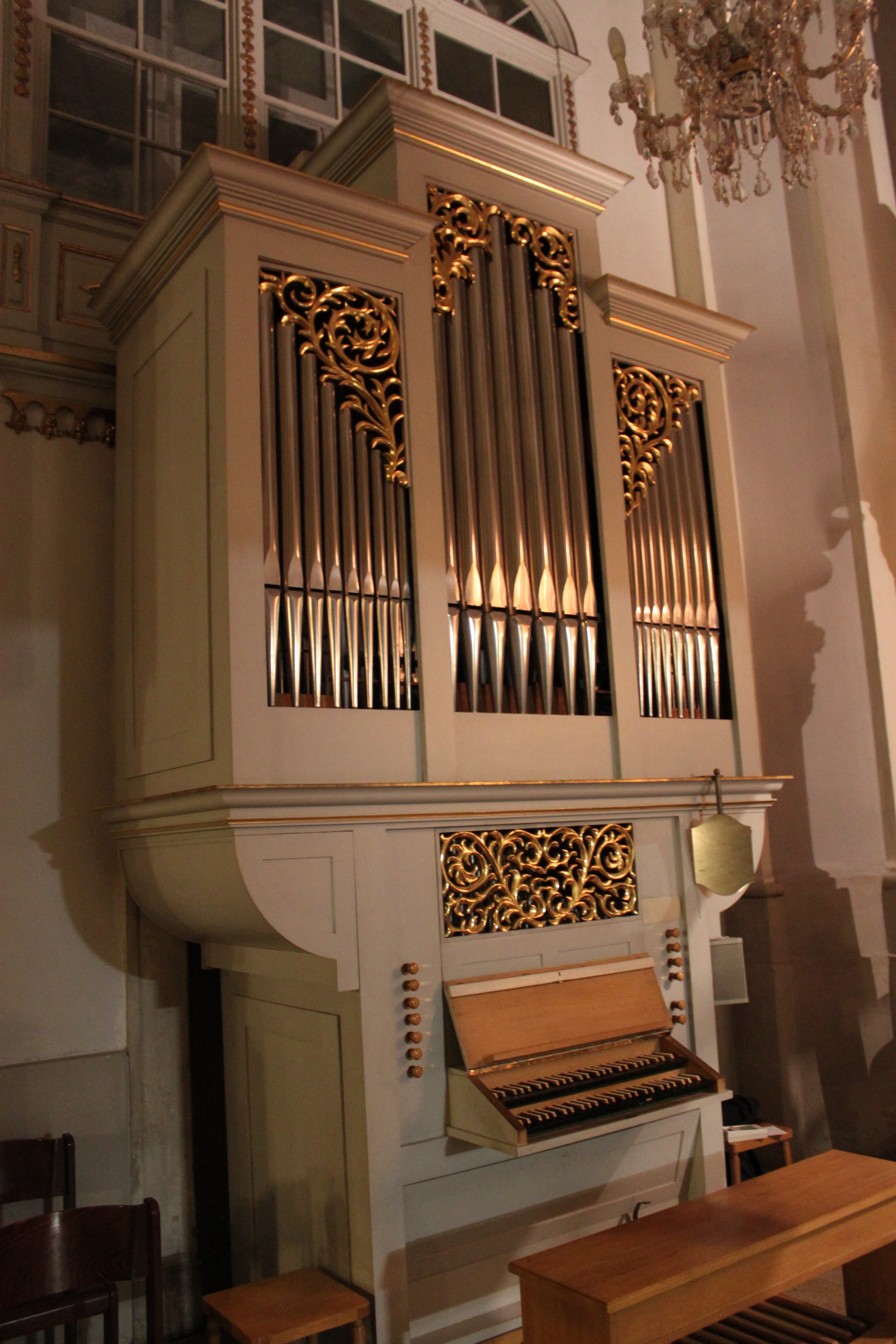 Chororgel der Gumpendorfer Pfarrkirche, errichtet 1987 von Herbert Gollini.